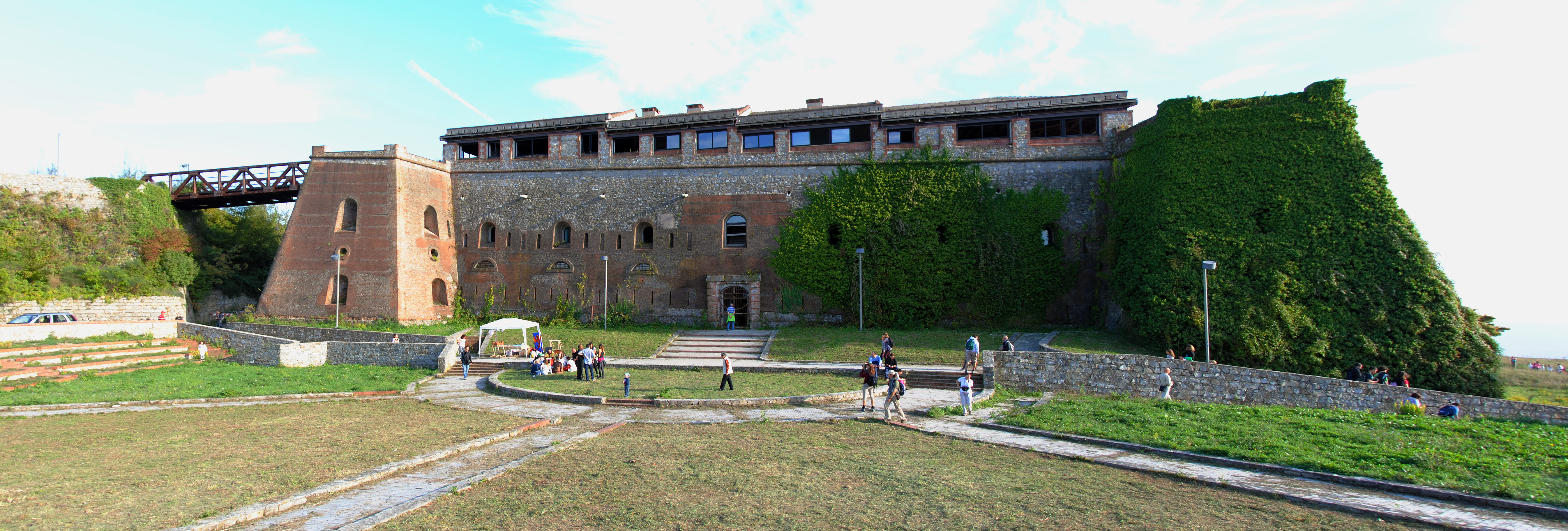 Ingresso laterale del Forte Begato - Genova - ottobre 2015